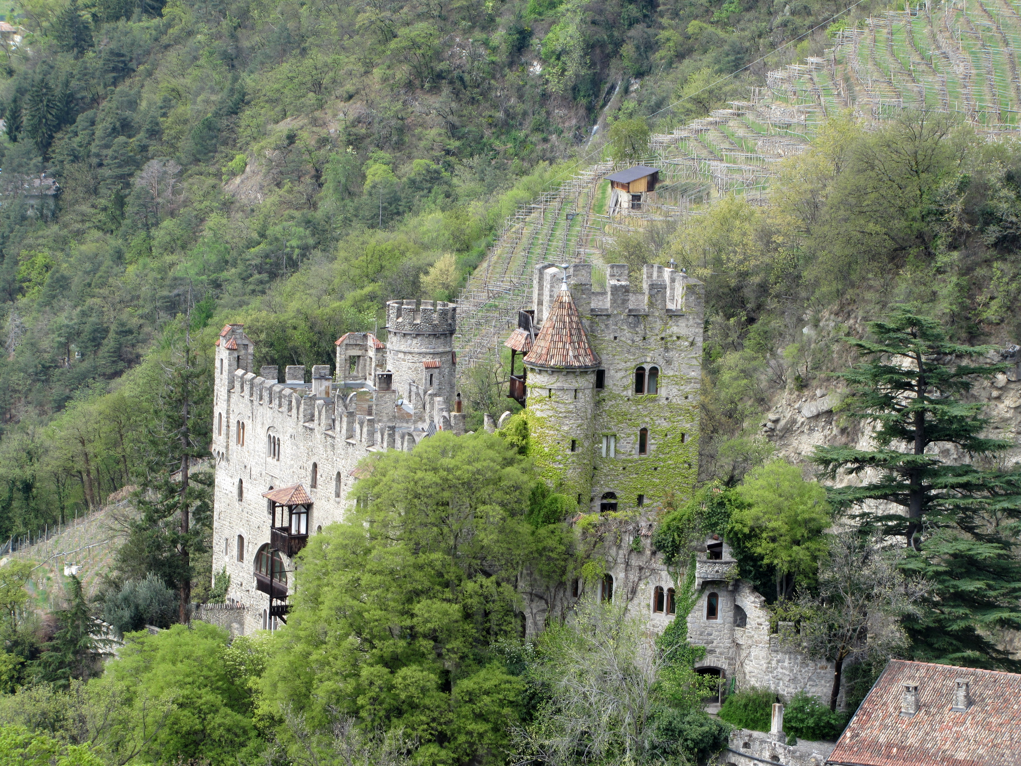 Brunnenburg in Dorf Tirol